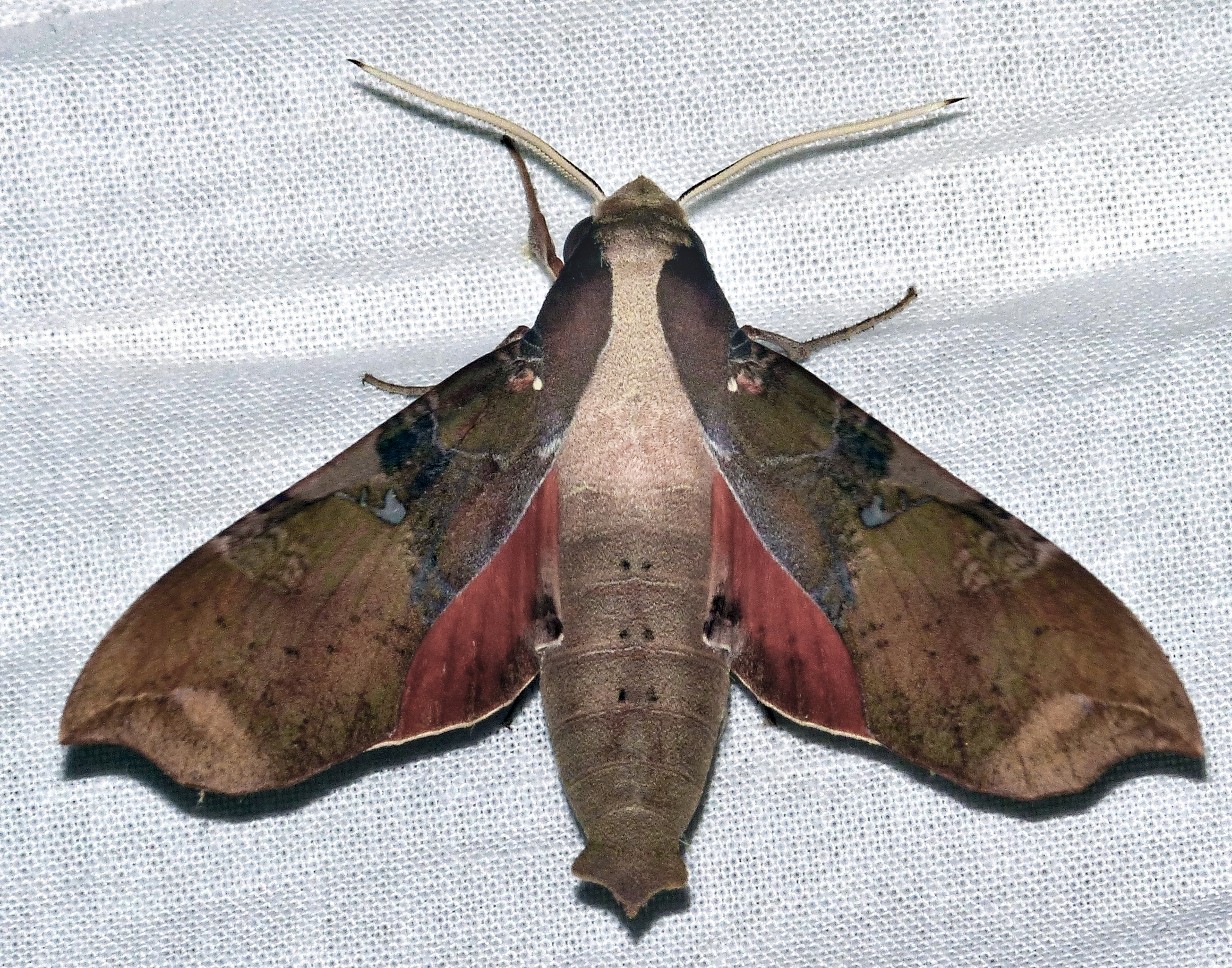 Santa Isabel Road, Transpantaneira, Poconé, Mato Grosso, BRAZIL